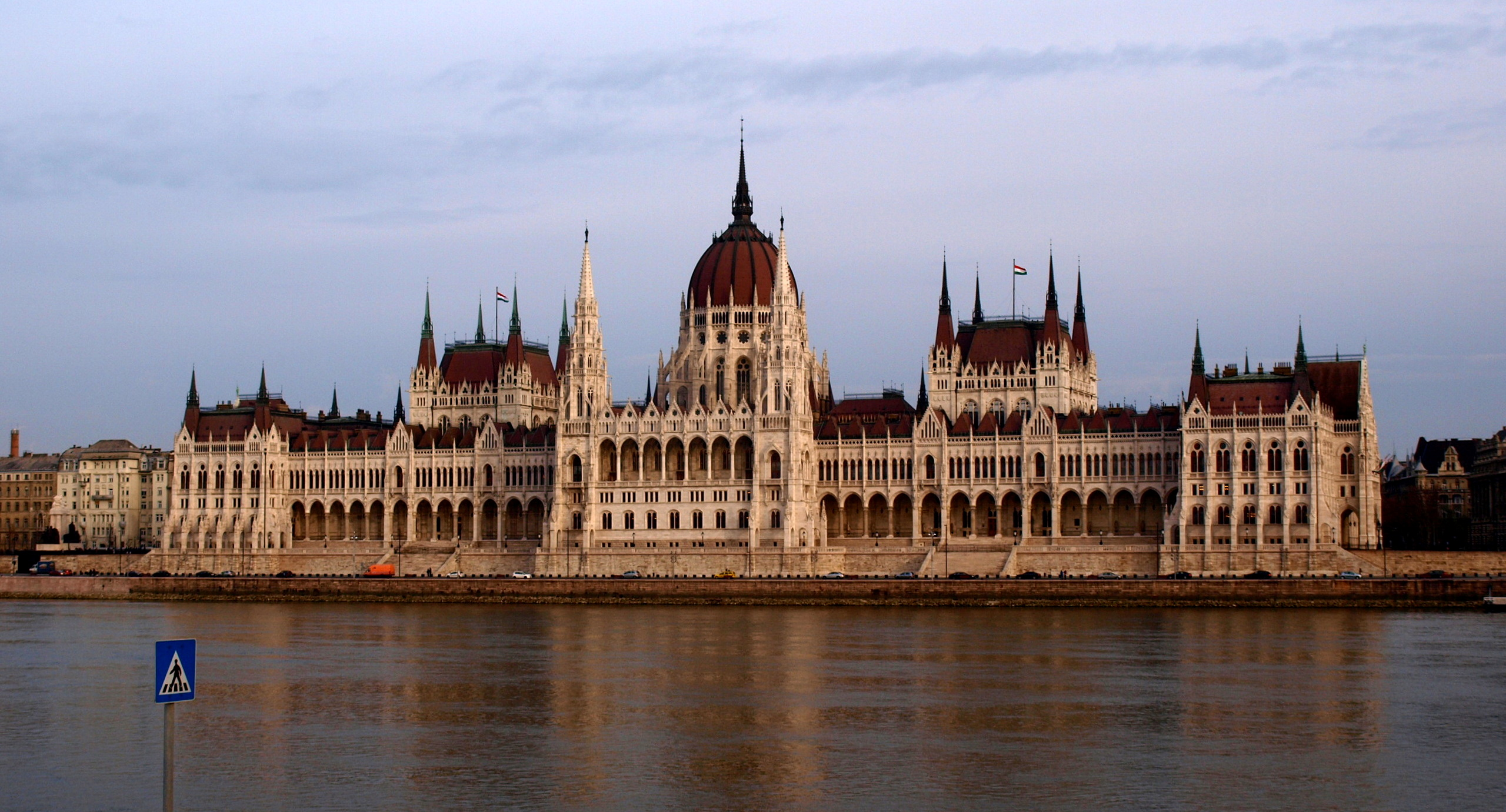 Maďarský parlament